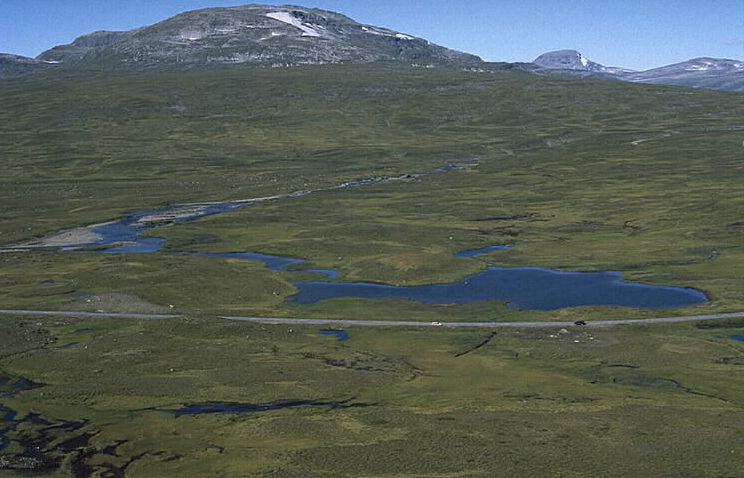 Motiv: Hamptjärn Nyckelord: Flygbilder, Riksintressen Kategori: Sameviste Hamptjärn